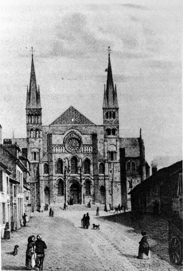 sur une vue ancienne.